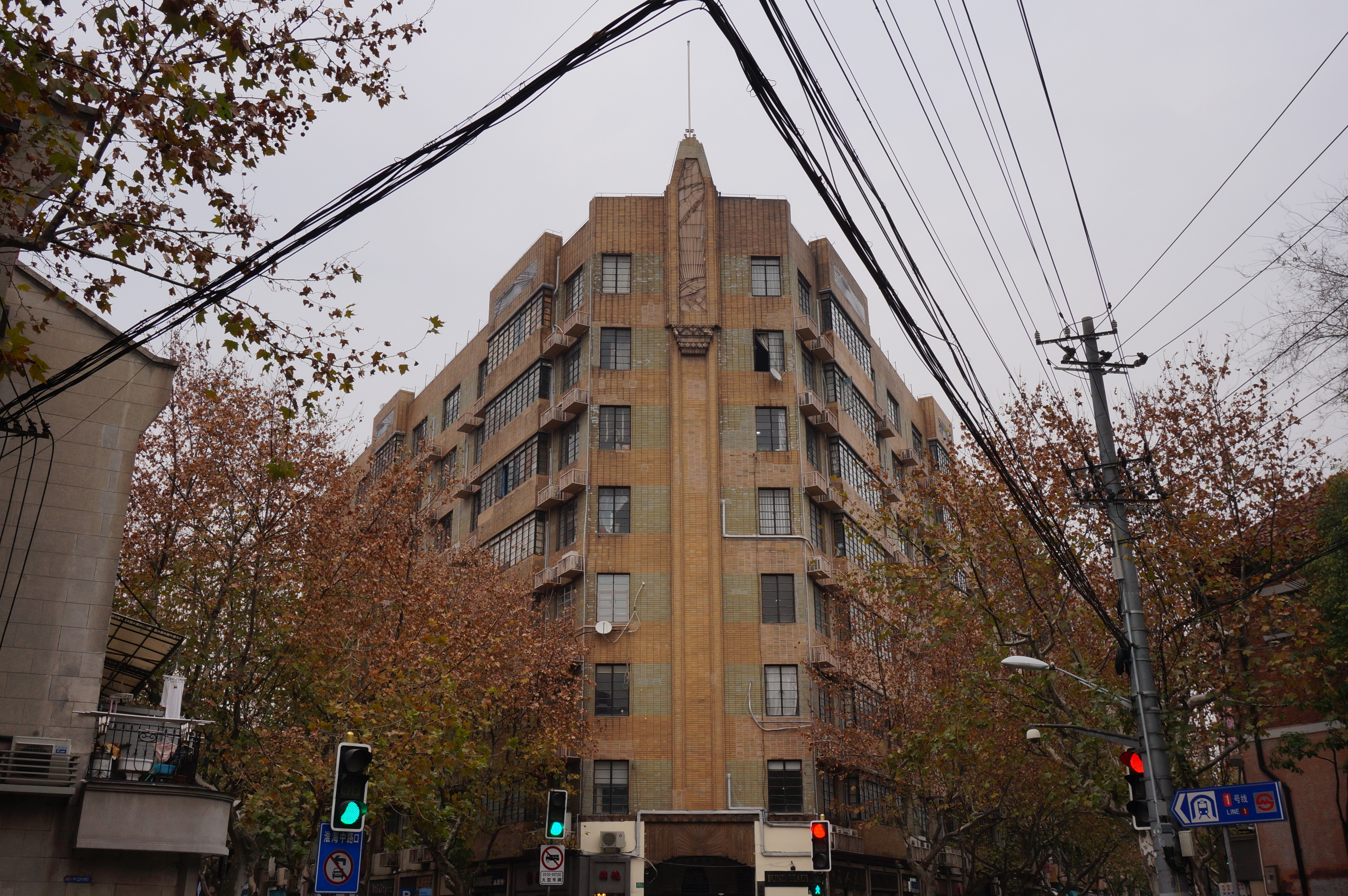 中文（中国大陆）: 阿斯特屈来特公寓（今南昌大楼）